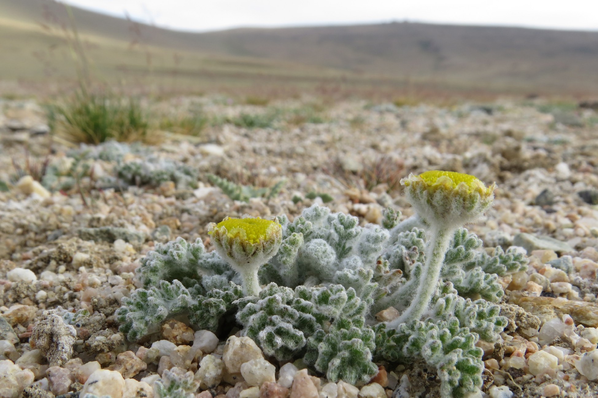 Цветущее растение. Монголия, Ховд сомон, 70-75 км южнее с. Манхан, котловина оз. Давст-Нур, 2546 м н.у.м., днище сухой долины.